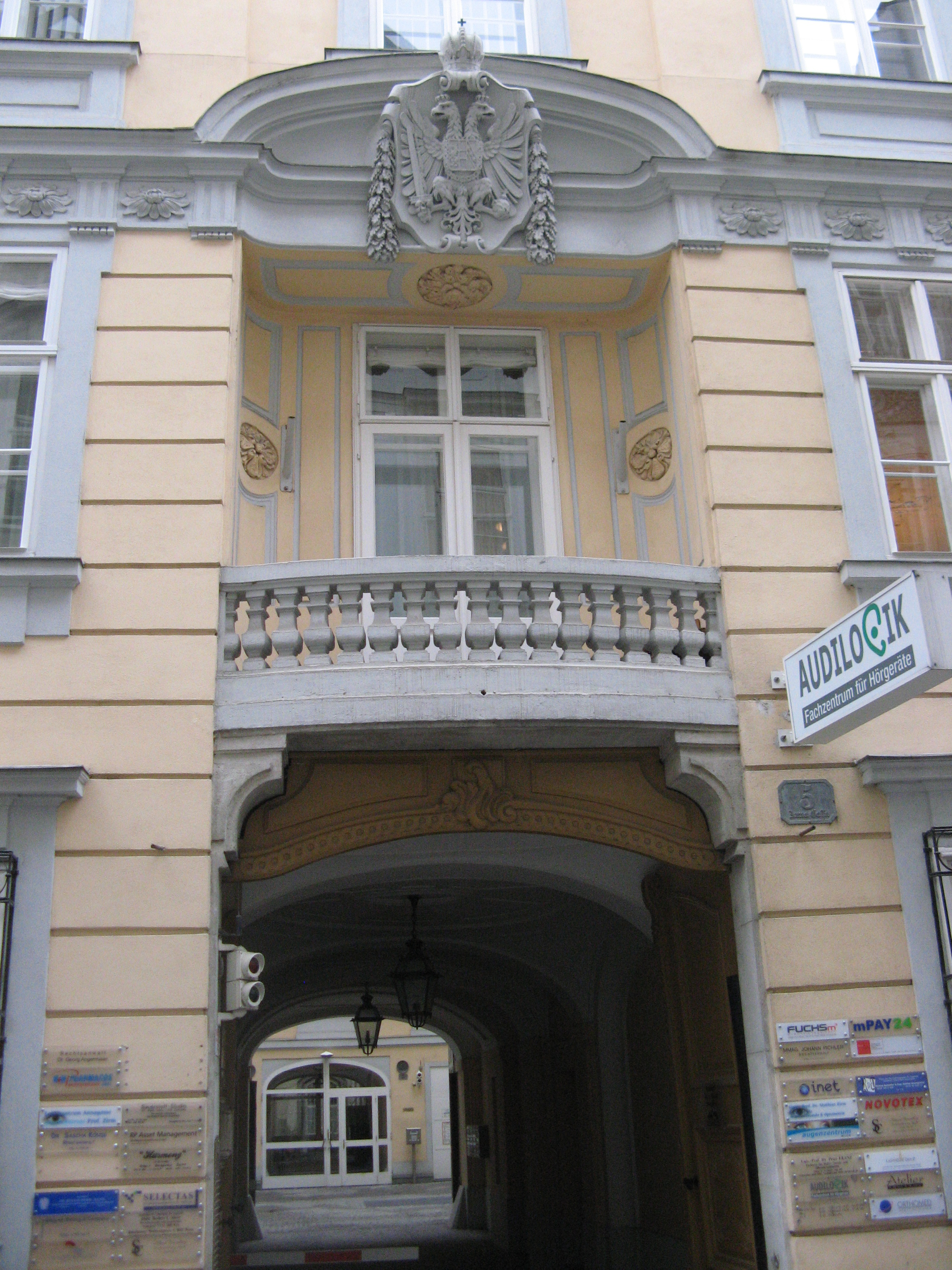 Klein-Mariazeller-Hof, Detail, Annagasse 5, Wien-Innere Stadt